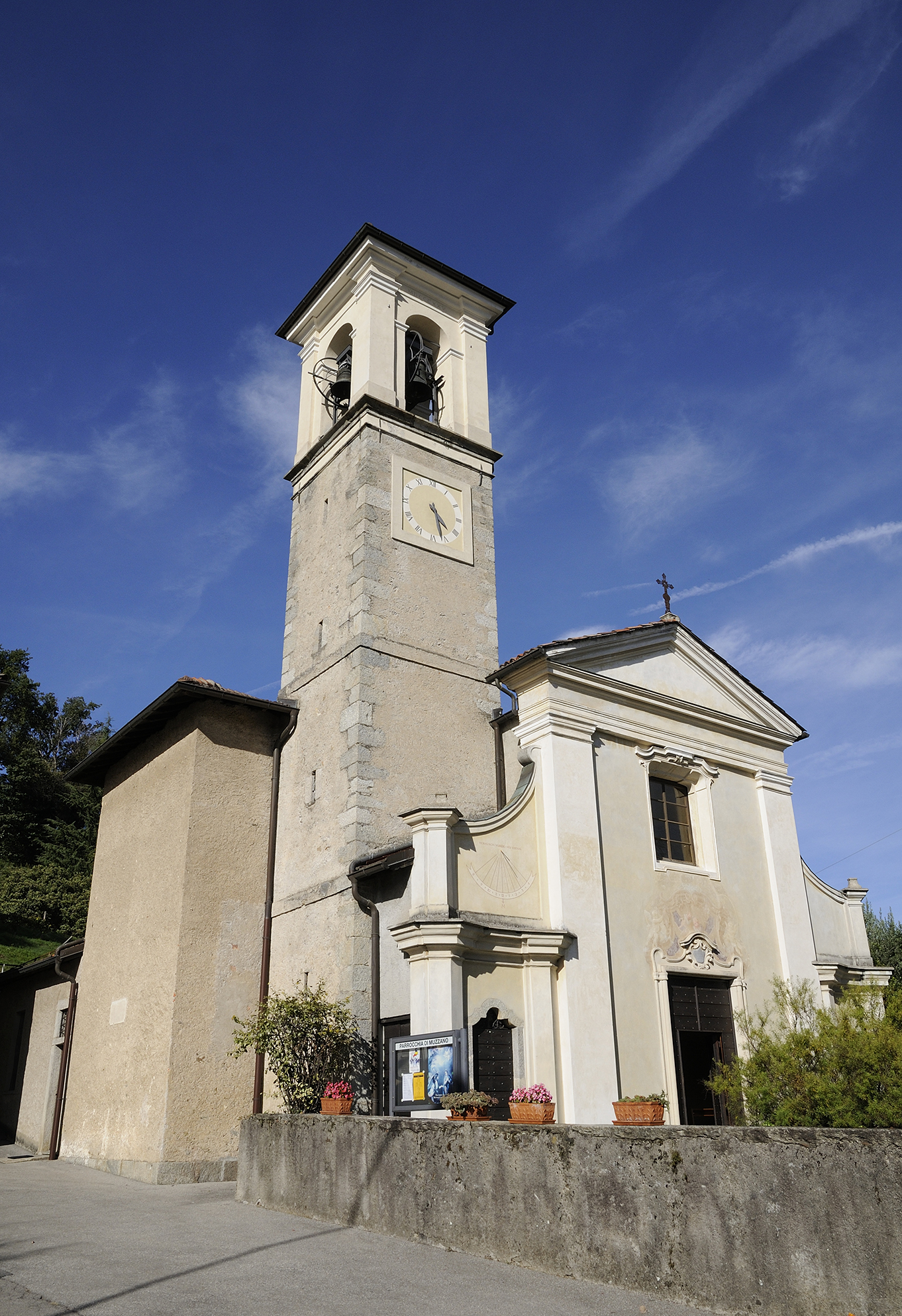 Chiesa Annunciazione di Maria Vergine - Muzzano